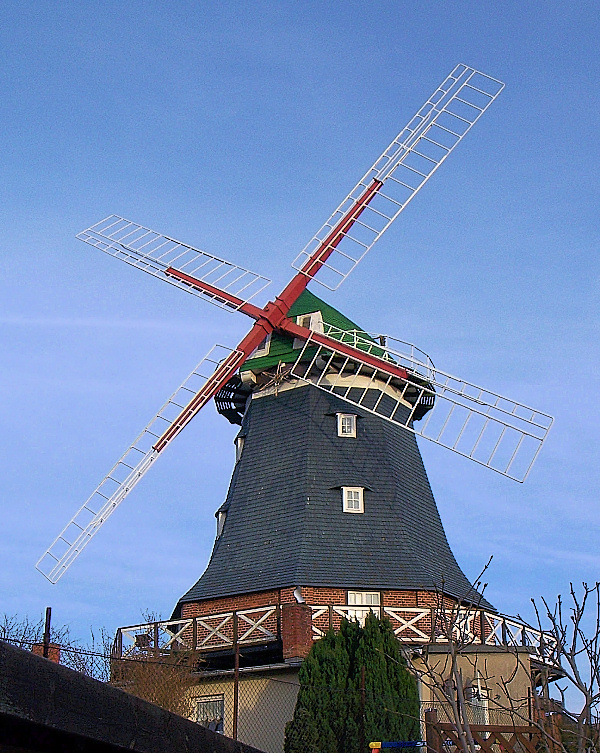 Windmühlen in Kröpelin